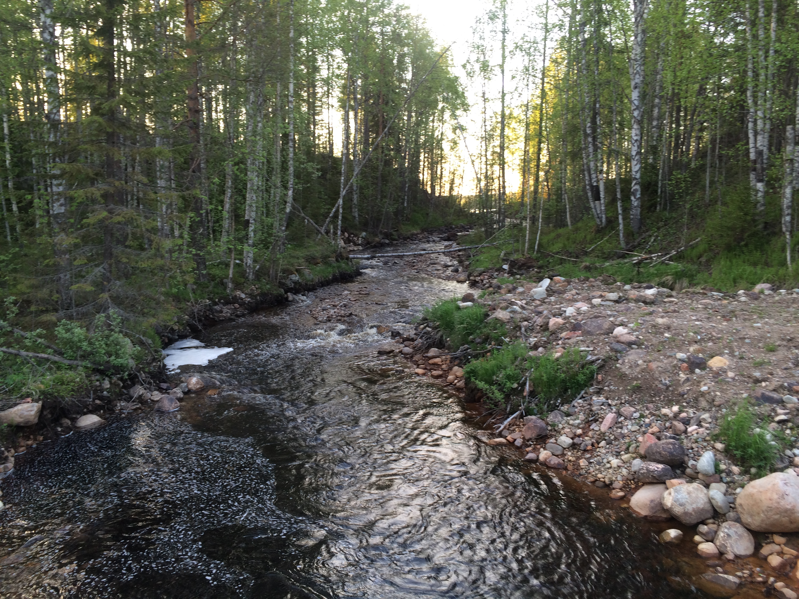 река Кис-Кис